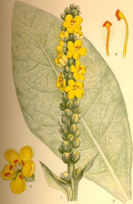 Kungsljus (Verbascum thapsus)